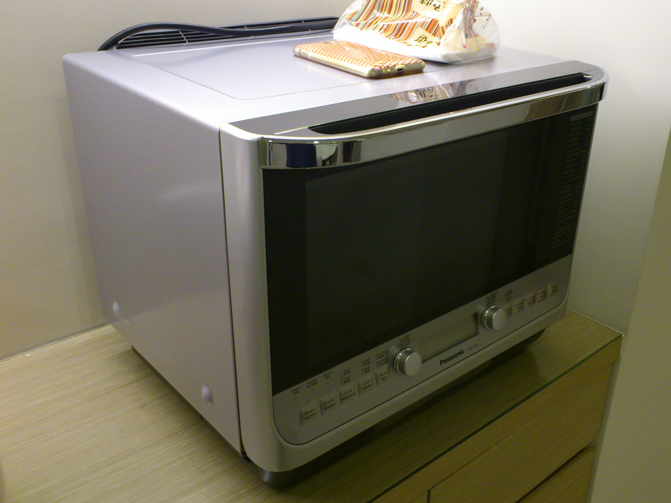 2012年1月製造的台灣Panasonic NN-SV30微波爐